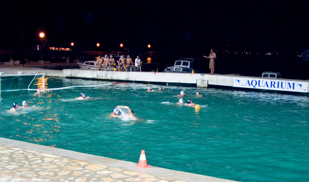 Vaterpolska utakmica Primorja i Opatije u Crikvenici